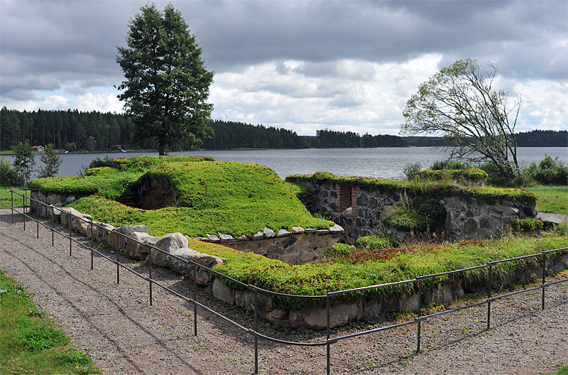 Ramundeboda klosterruin i Laxå kommun